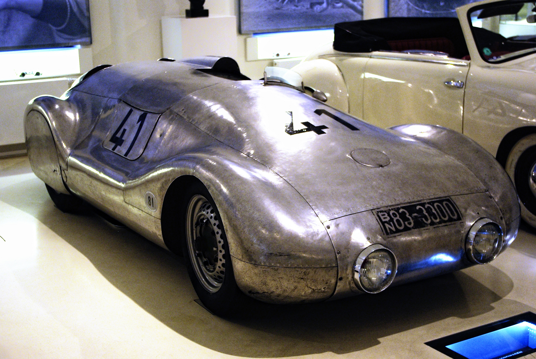 Petermax Müller Weltrekordwagen